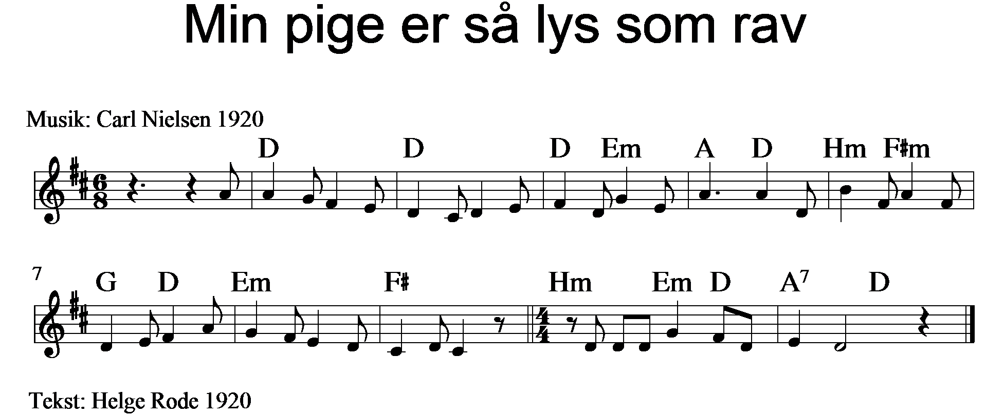 Carl Nielsen's melody to the song "Min pige er så lys som rav" from 1920